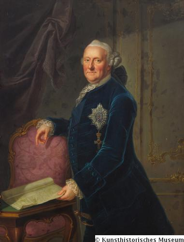 Herzog Ferdinand (1721-1792) von Braunschweig - Wolfenbüttel, KniestückSignatur: Sig. und dat. auf der Rückseite: peint par Rosnie de Gasc née de Lisiewska à Bronswic 1773